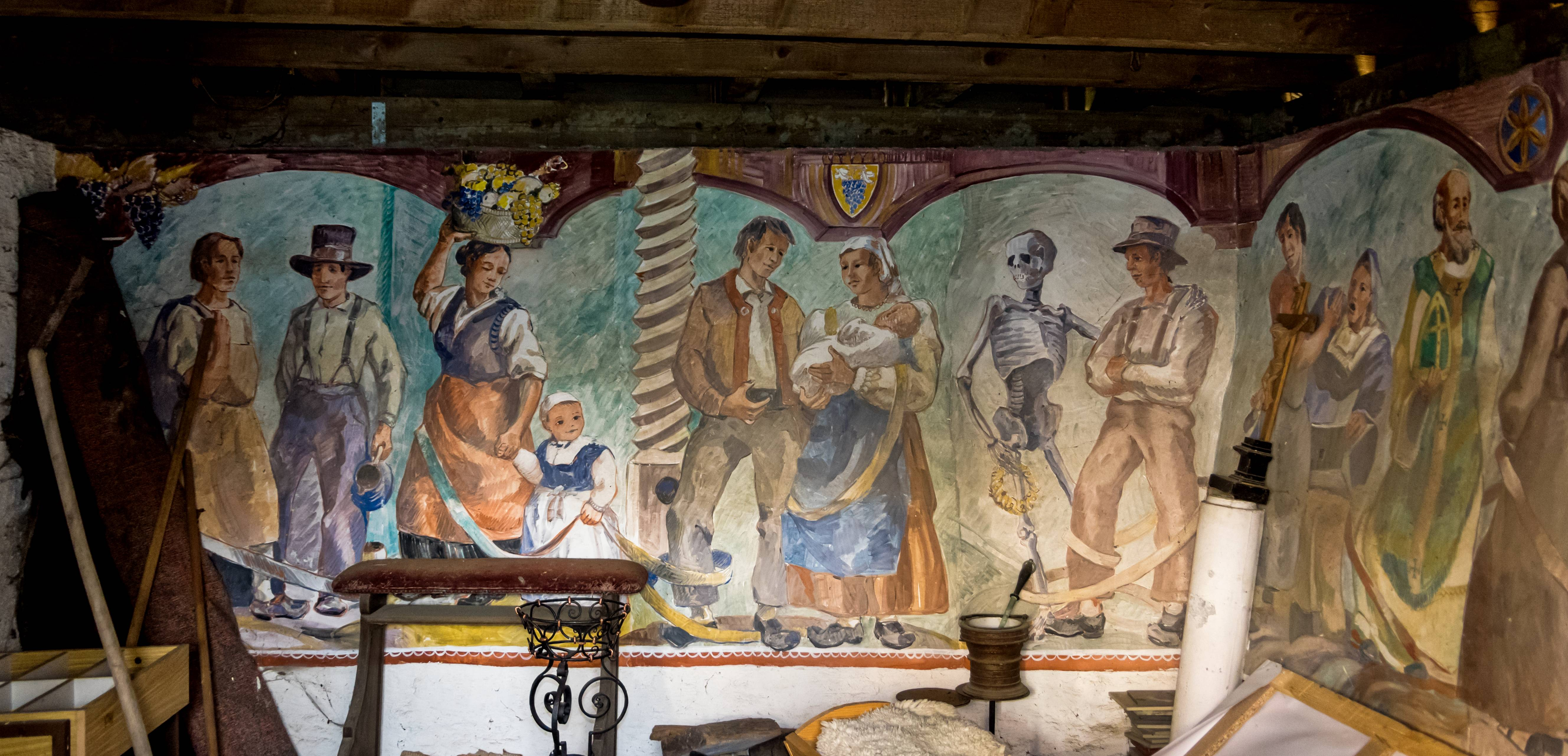 Bilder aus Staufen/Grunern Die Kirche St. Agatha in Grunern